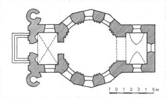 План кальвінскага збора. Кухцічы